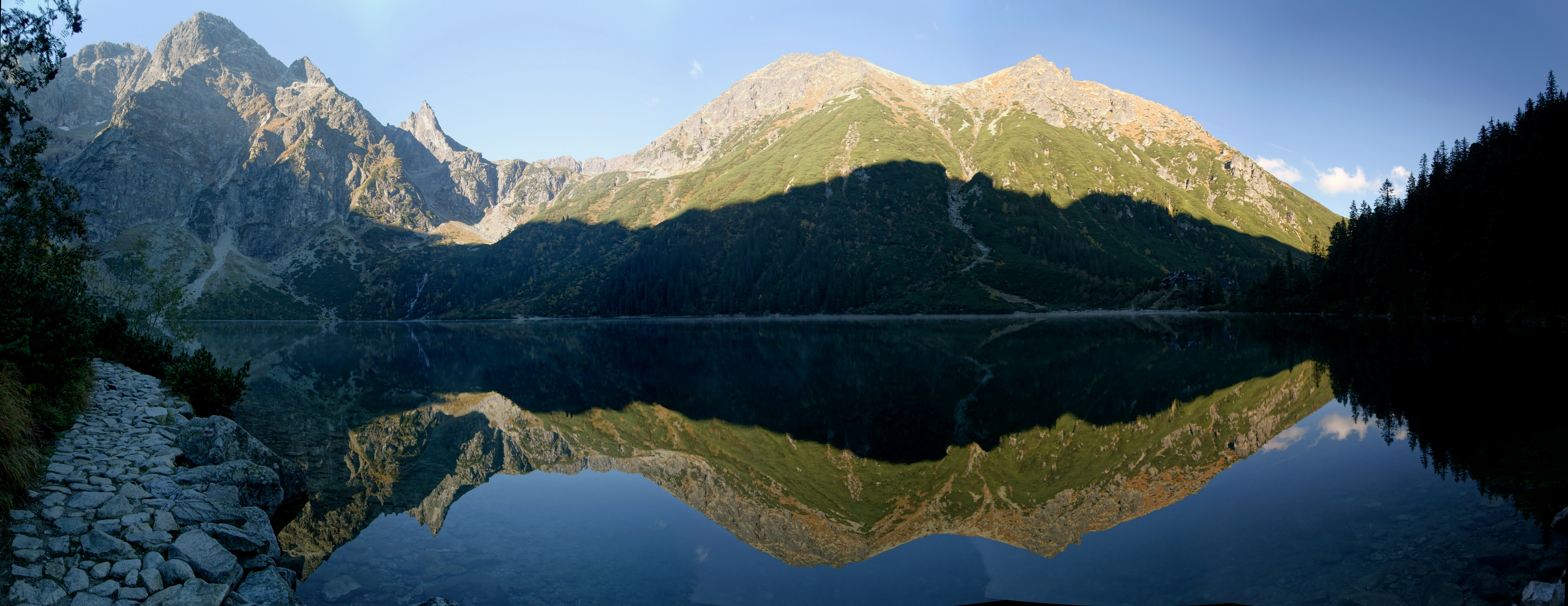 Morskie Oko at morning